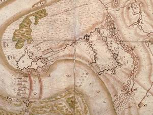 Опсада Петроворадина 1694